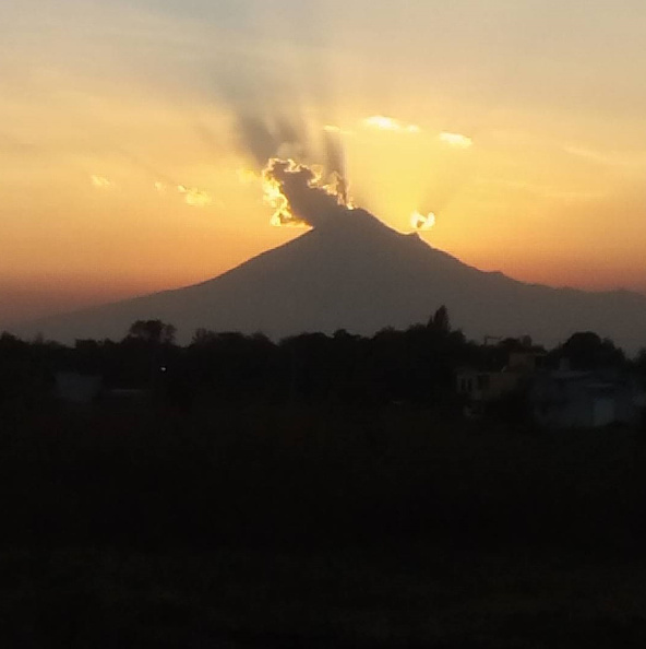 Volcán Popocatepetl visto desde Zacatelco